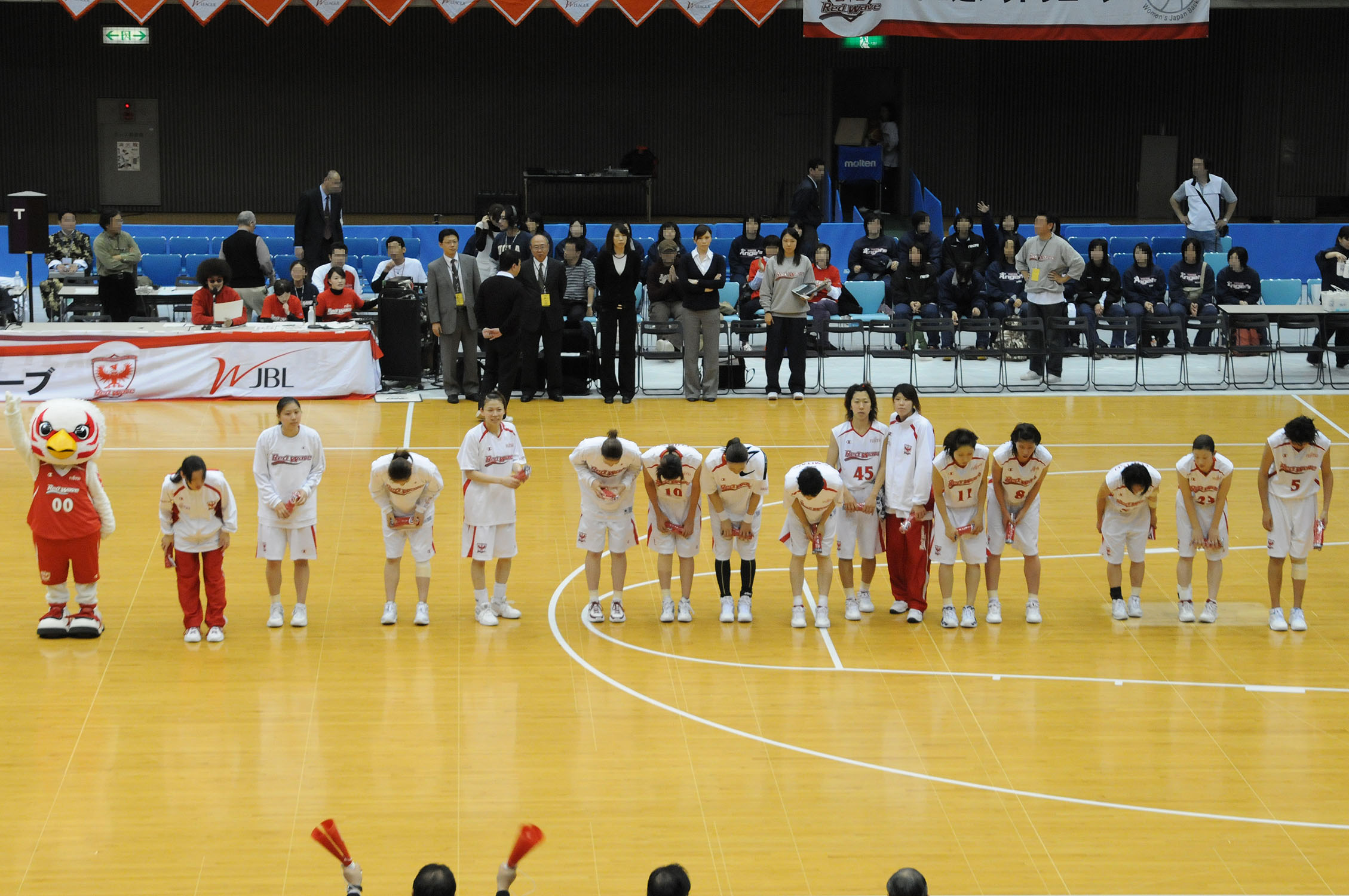 富士通レッドウェーブ、とどろきアリーナで。